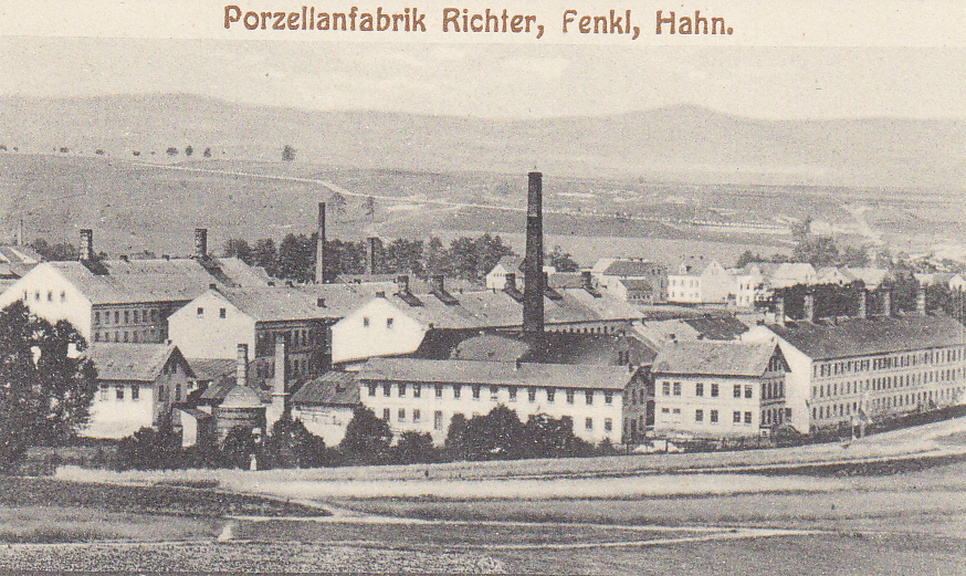 Areál porcelánky Richter, Fenkl & Hahn na snímku z počátku 20. století. Porcelánka v té době zaměstnávala téměř tisíc osob.